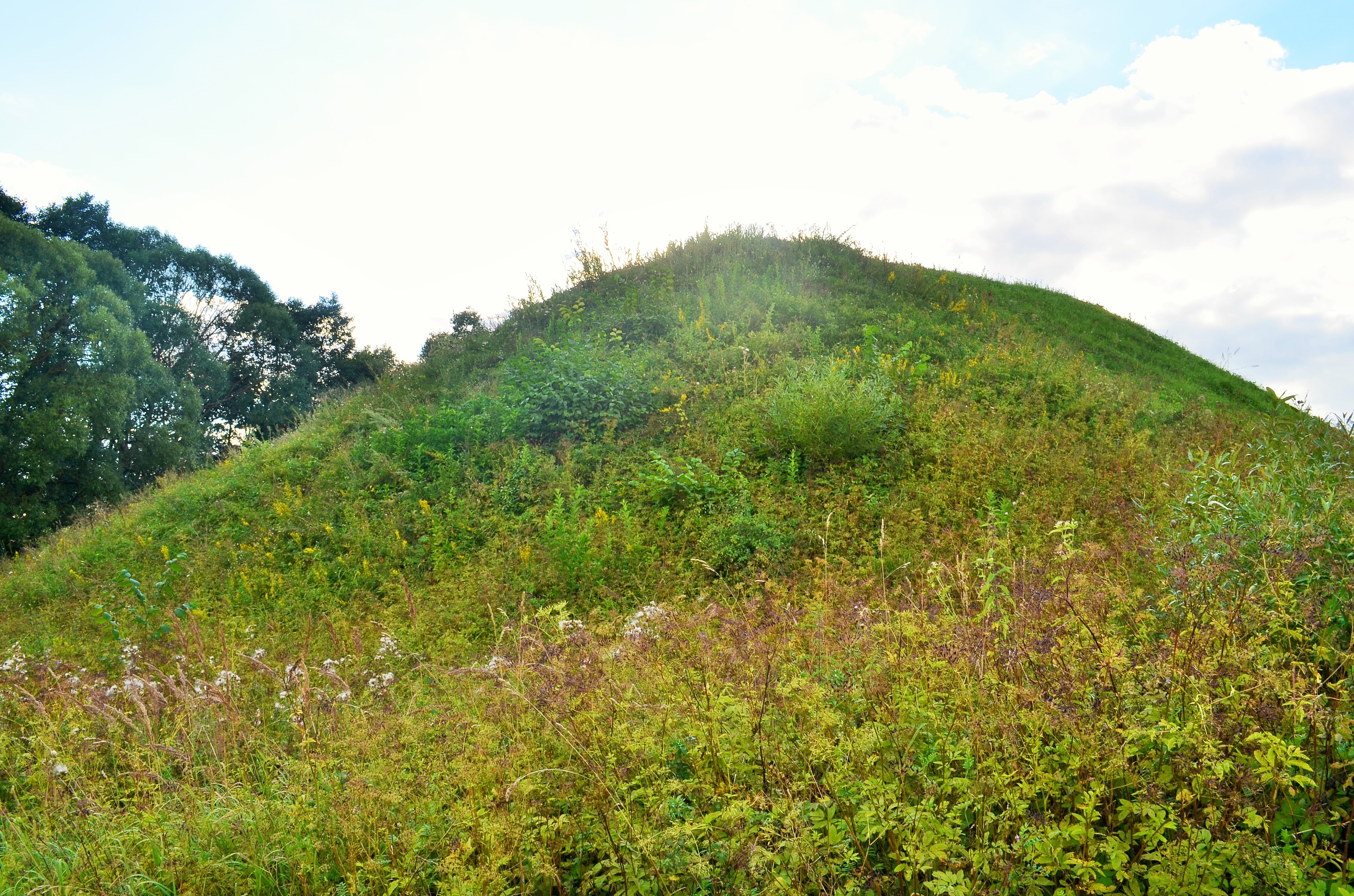 Milžinų kalnas iš pietryčių, Poteronys, Alytaus raj.